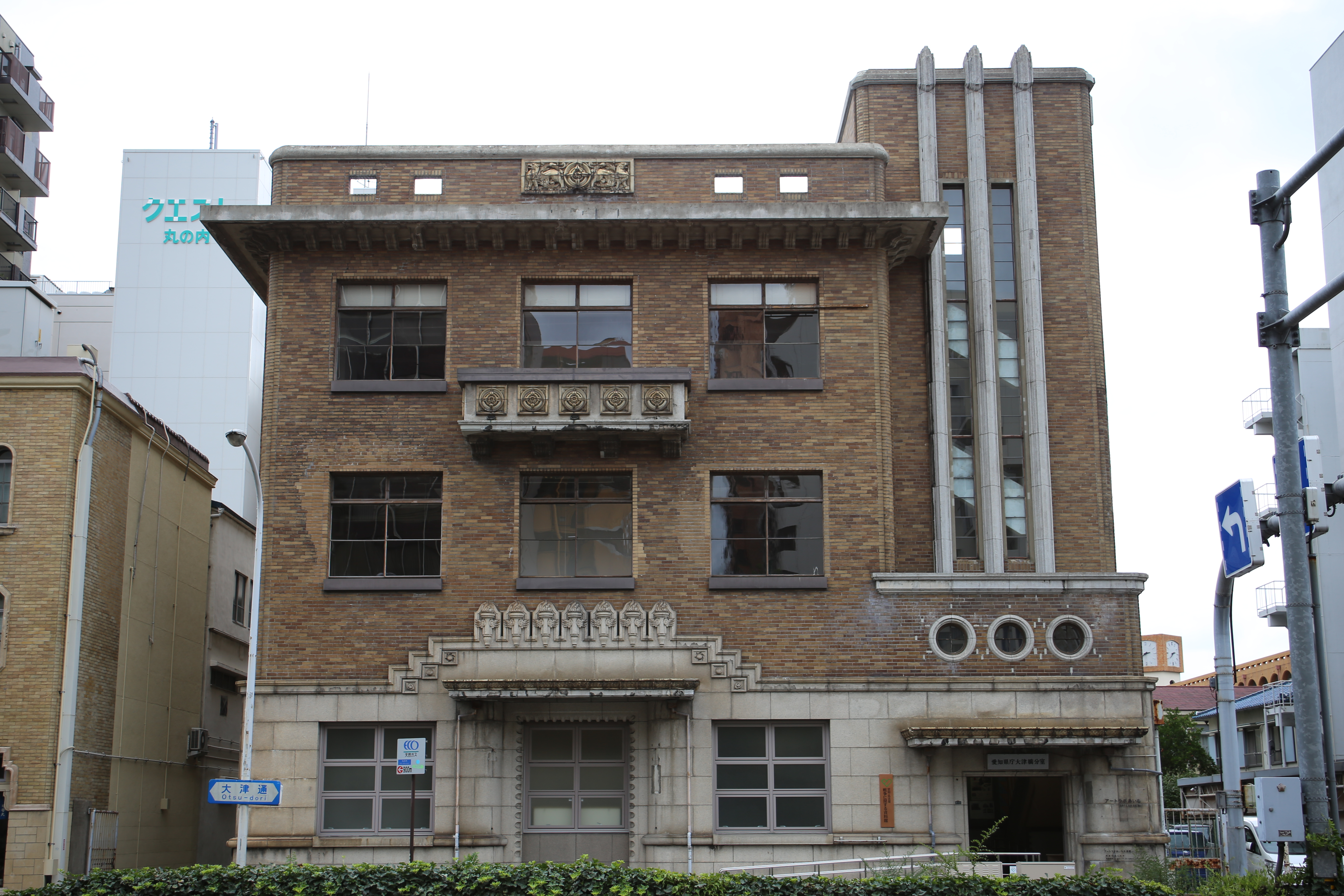 名古屋市中区三の丸三丁目の愛知県庁大津橋分室を東側公道より撮影